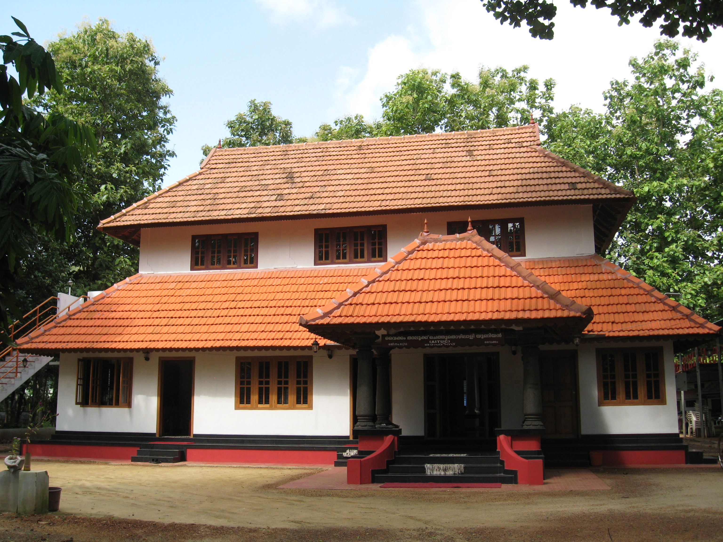 വൈക്കത്തെ ഇണ്ടൻ തുരുതിൽ മന